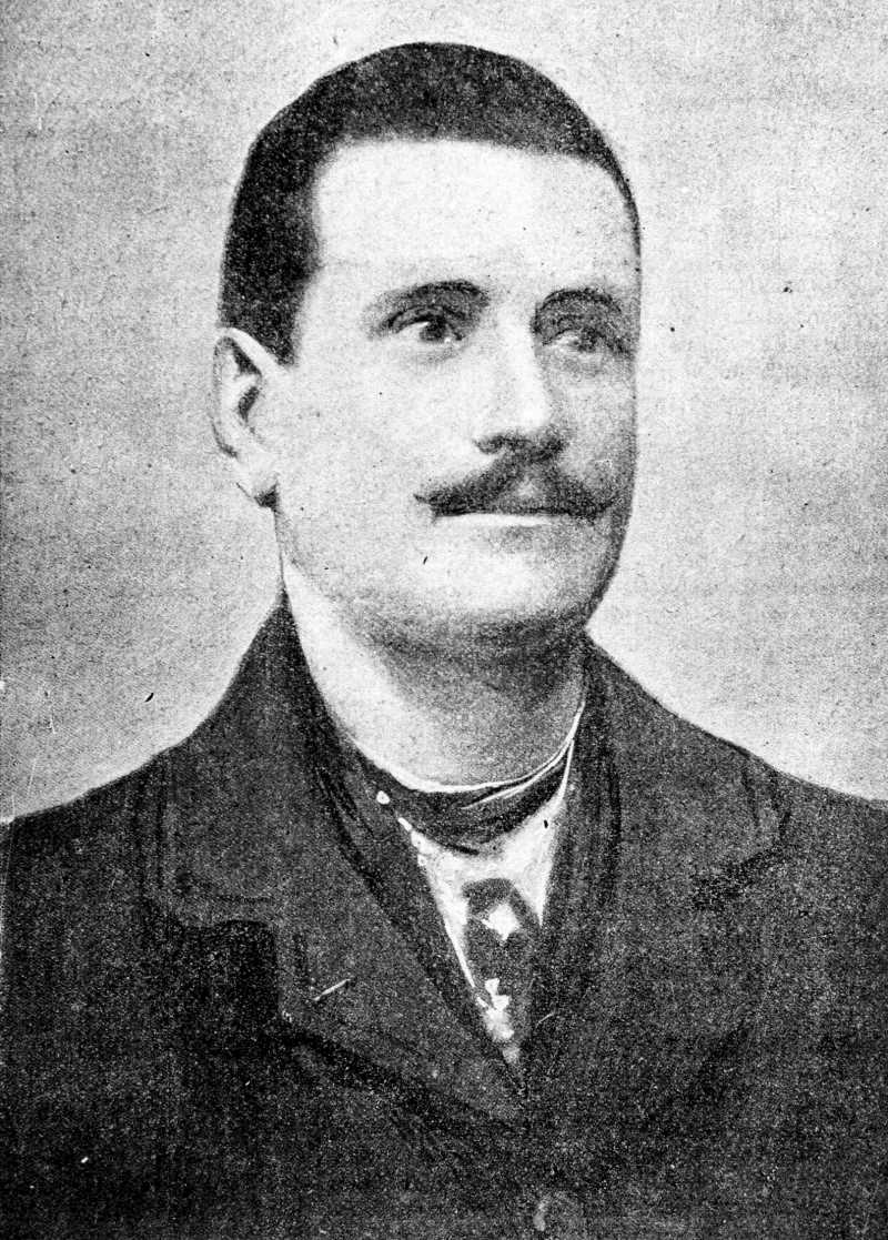 Pietro Umberto Acciarito, né en 1871 à Artena, dans la province de Rome, dans le Latium et mort en 1943 à Montelupo Fiorentino, est un anarchiste italien.